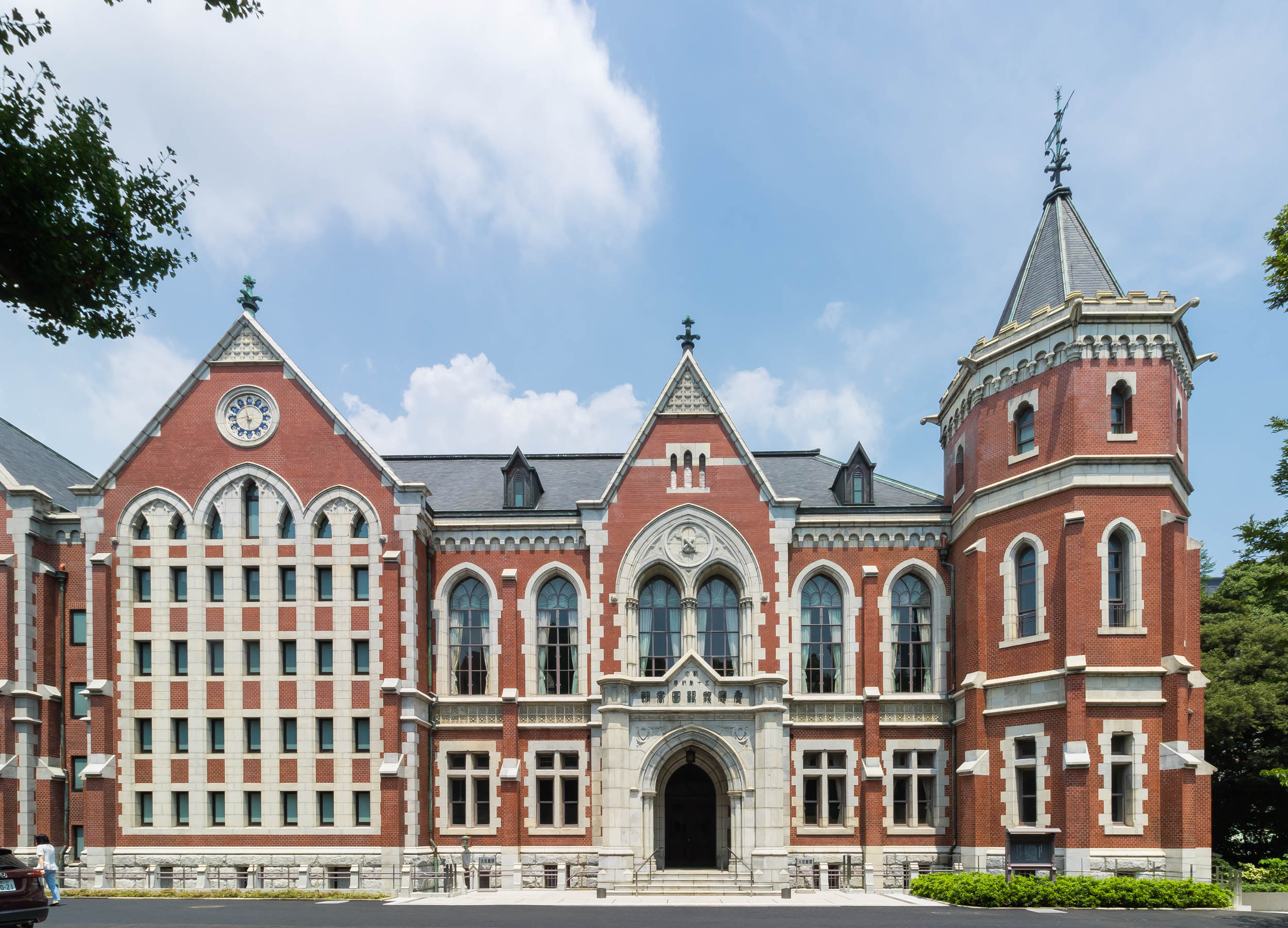 慶應義塾大学旧図書館(重要文化財)、東京都港区、曽禰達蔵設計、1912年。